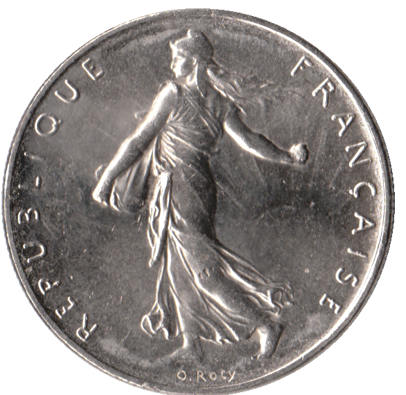 avers d'une pièce de 1 Franc 1999